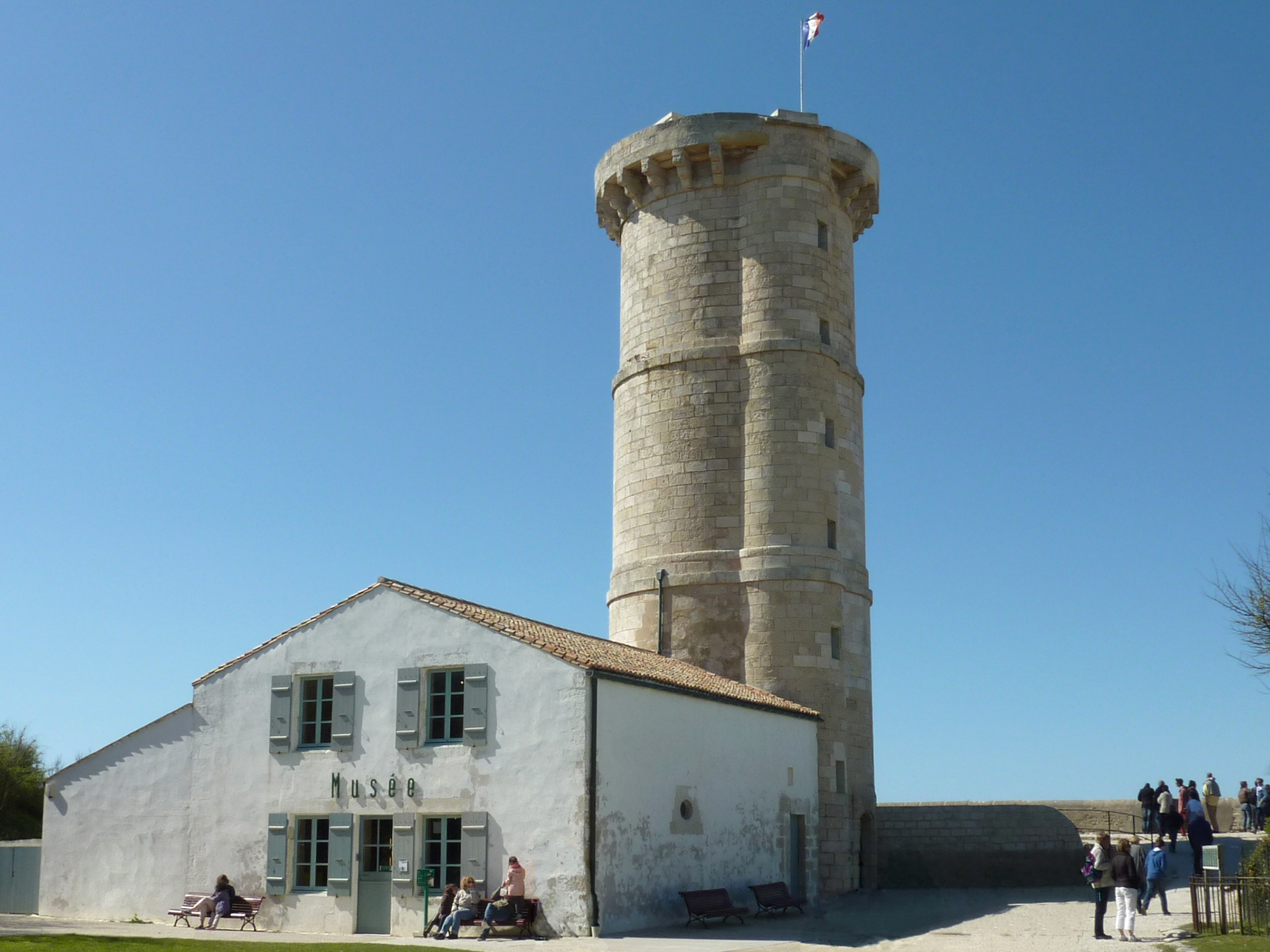 Ancien phare et musée consacré aux phares et balises dans l'ancien bâtiment de l'école des gardiens de phare Saint-Clément-des-Baleines Charente-Maritime France .